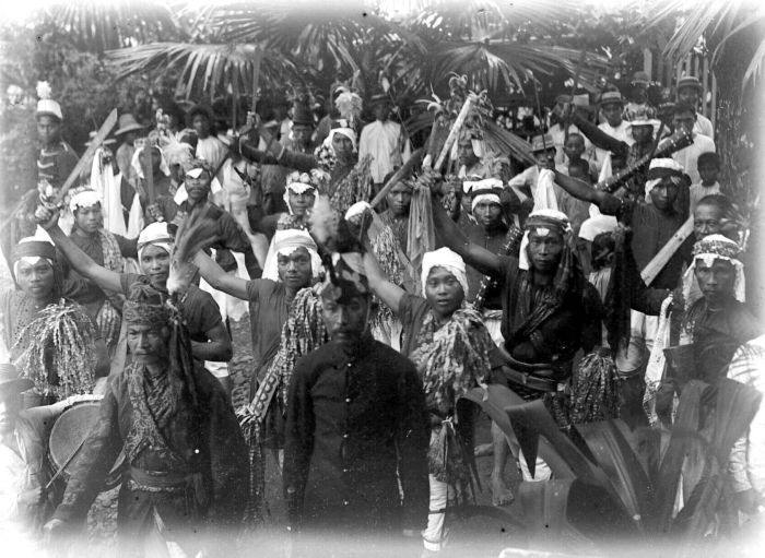 Repronegatief. Tjakalélé-dansers in Minahasa, Noord-Celebes